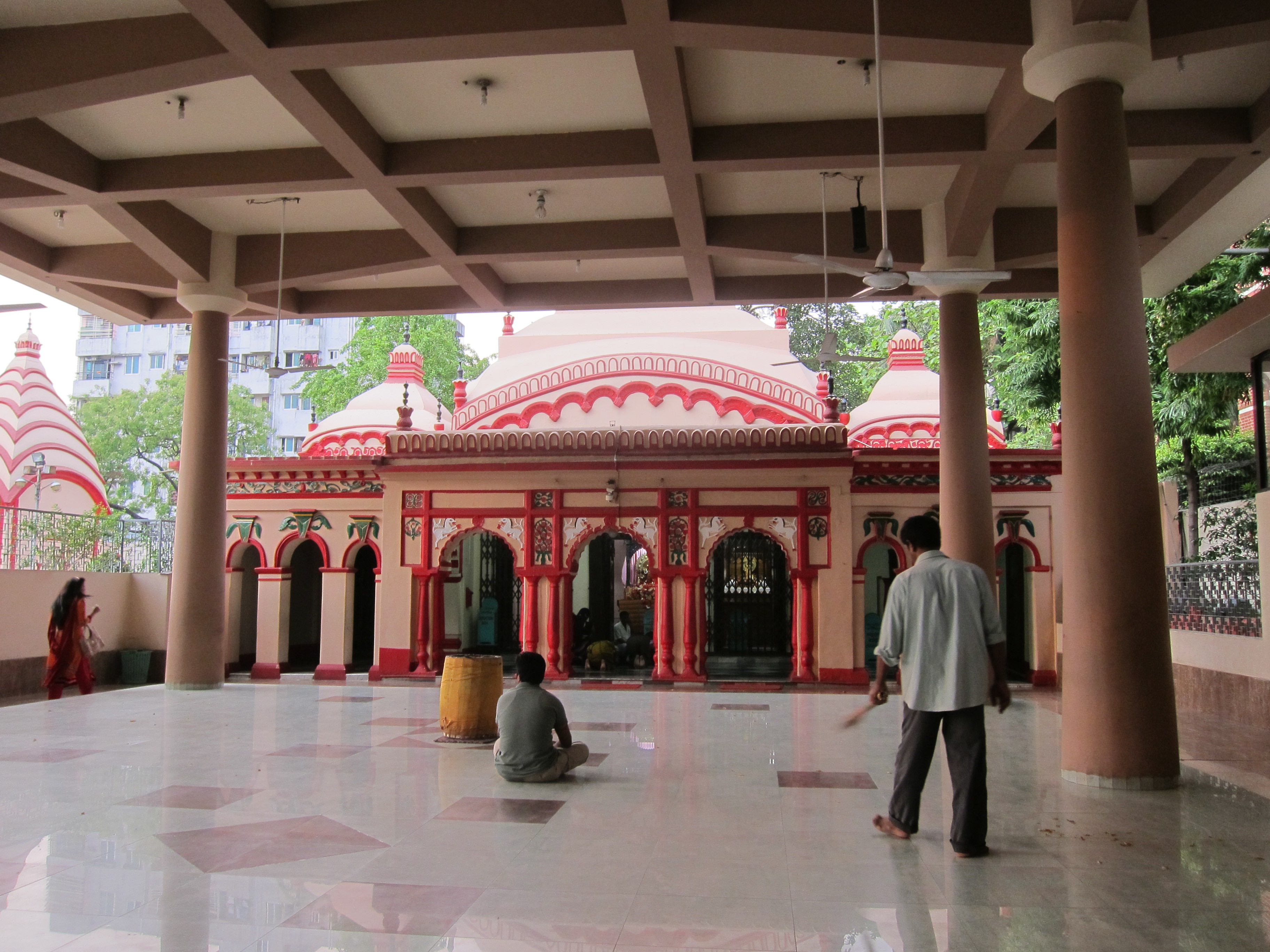 ঢাকেশ্বরী মন্দির